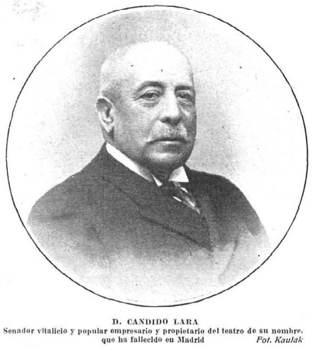 Senador vitalicio y popular empresario y propietario del teatro de su nombre que ha fallecido en Madrid